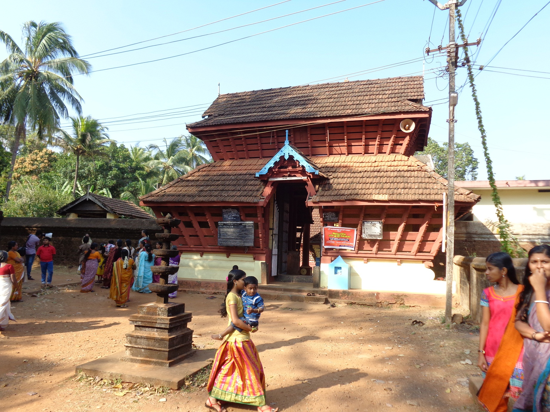 ആറ്റൂർ കാർത്യായനി ക്ഷേത്രം മുമ്പിൽ നിന്നുള്ള് കാഴ്ച